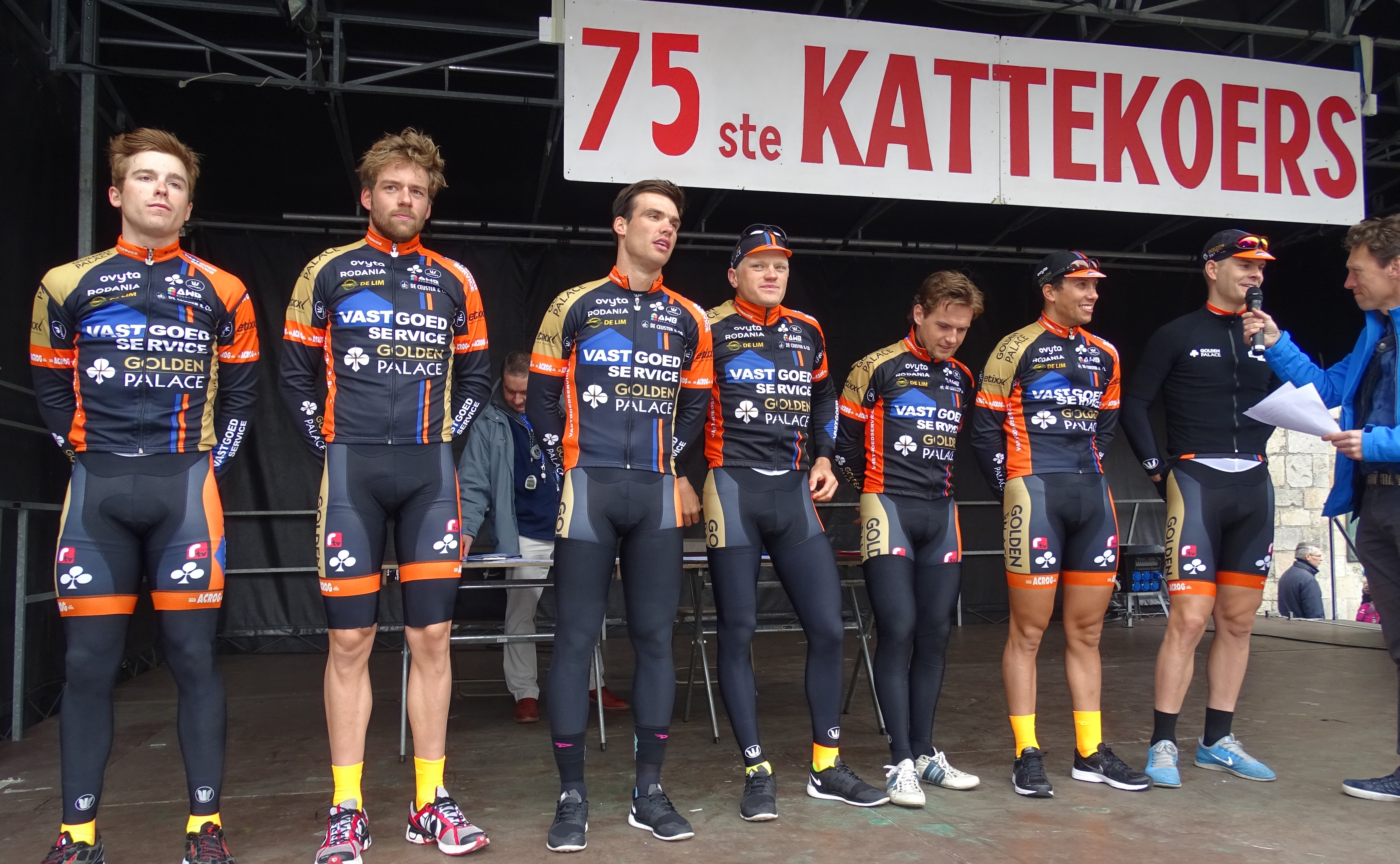 Reportage réalisé le dimanche 15 mars à l'occasion du départ et de l'arrivée de la Course des chats 2015 à Ypres, Belgique.